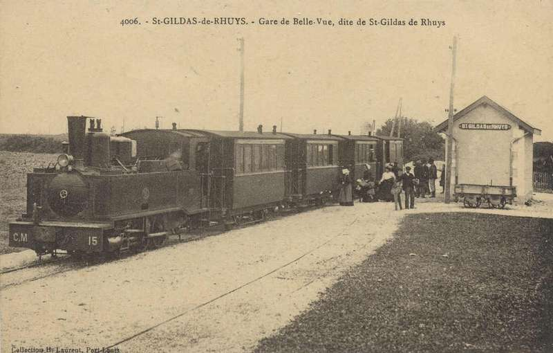 Locomotive des Chemins de Fer du Morbihan à la gare de Saint-Gildas